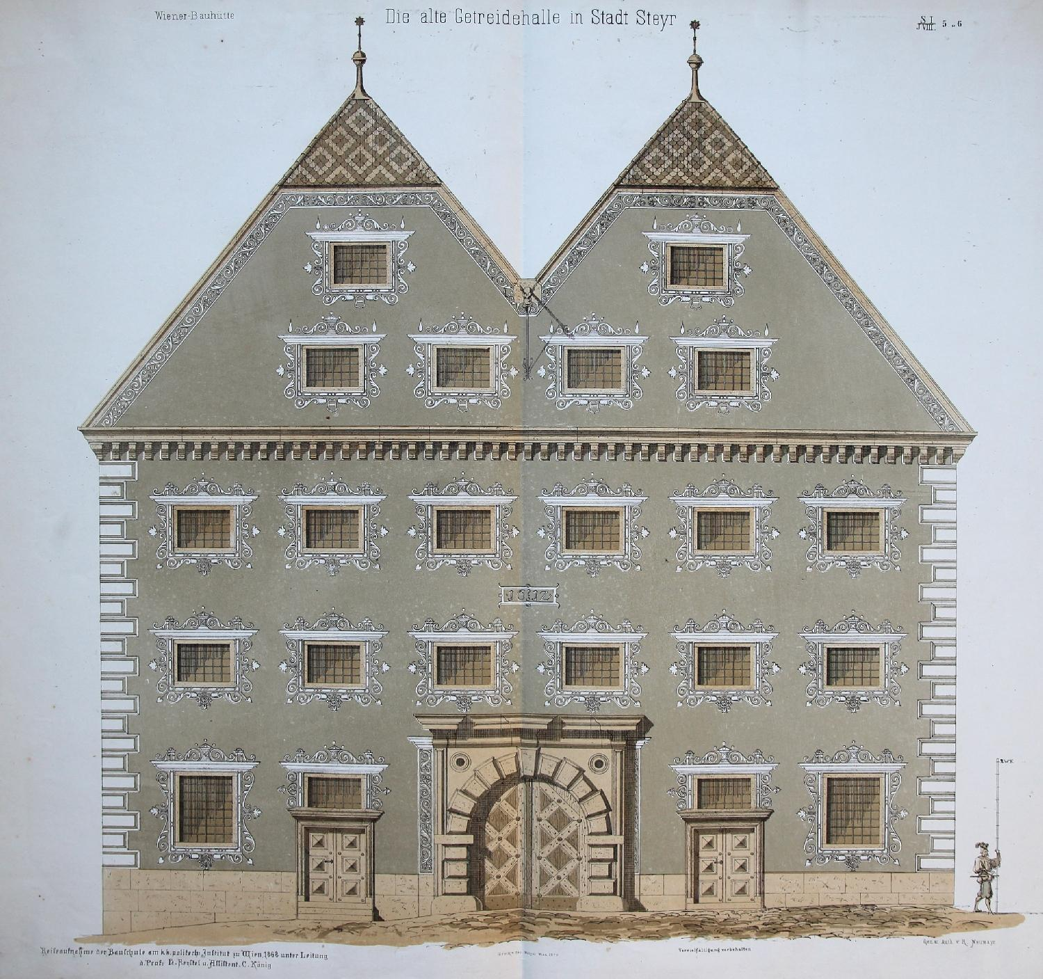 Aufriss des Innerberger Stadels in Steyr im historischen Bauzustand